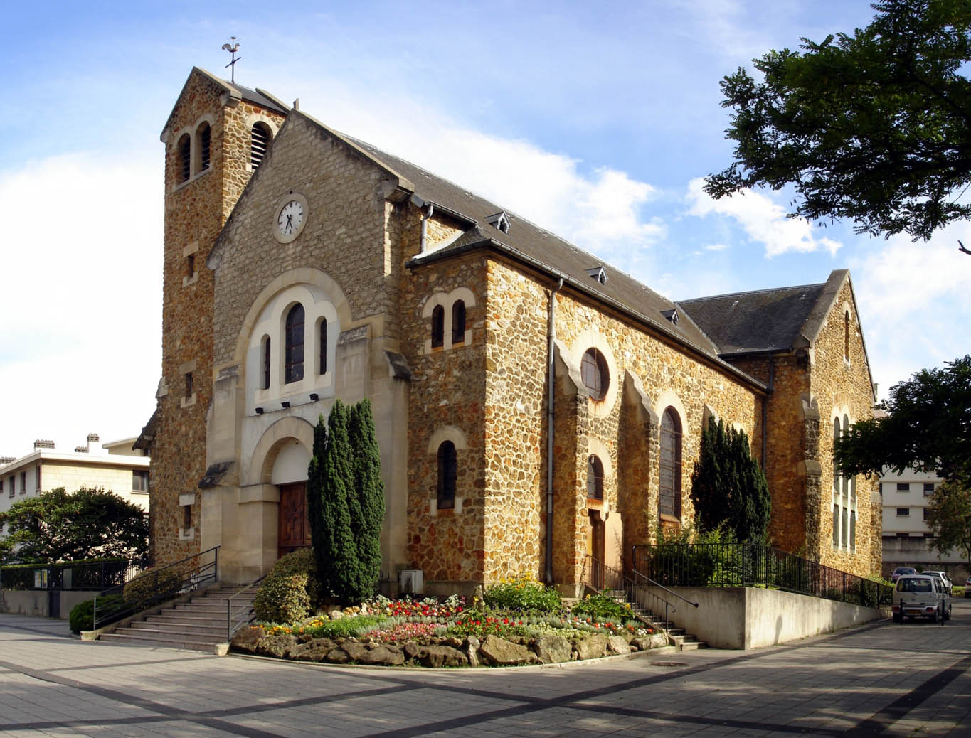 L'église Sainte-Madeleine de Franconville (Val-d'Oise), France